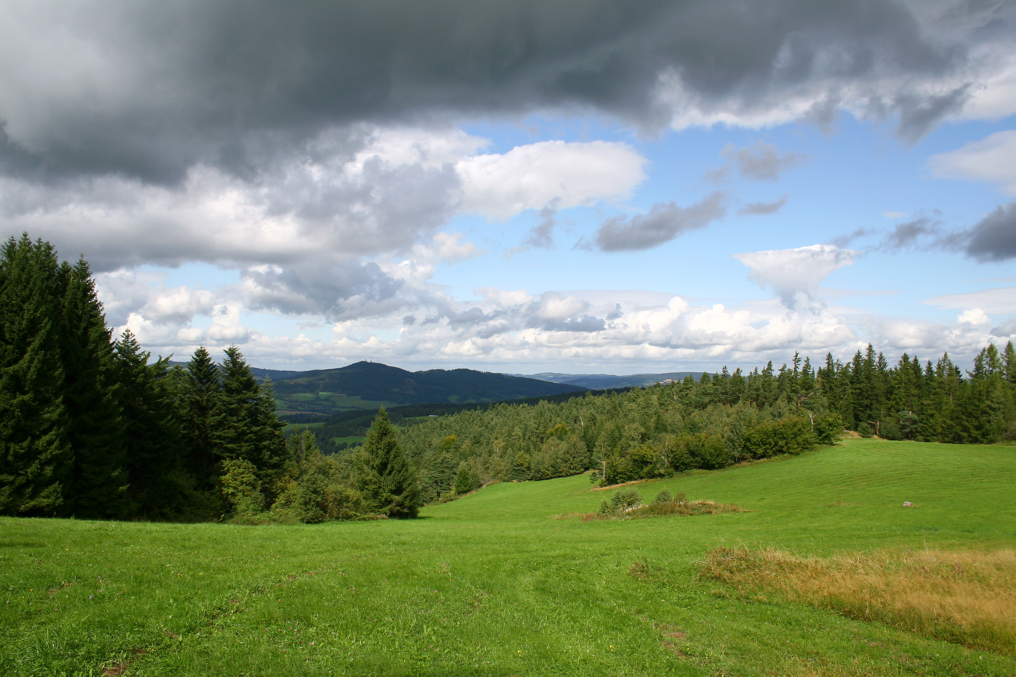 Pohled ze severozápadních svahů Sedla ke Svatoboru. Okres Klatovy, Plzeňský kraj, Česká republika.